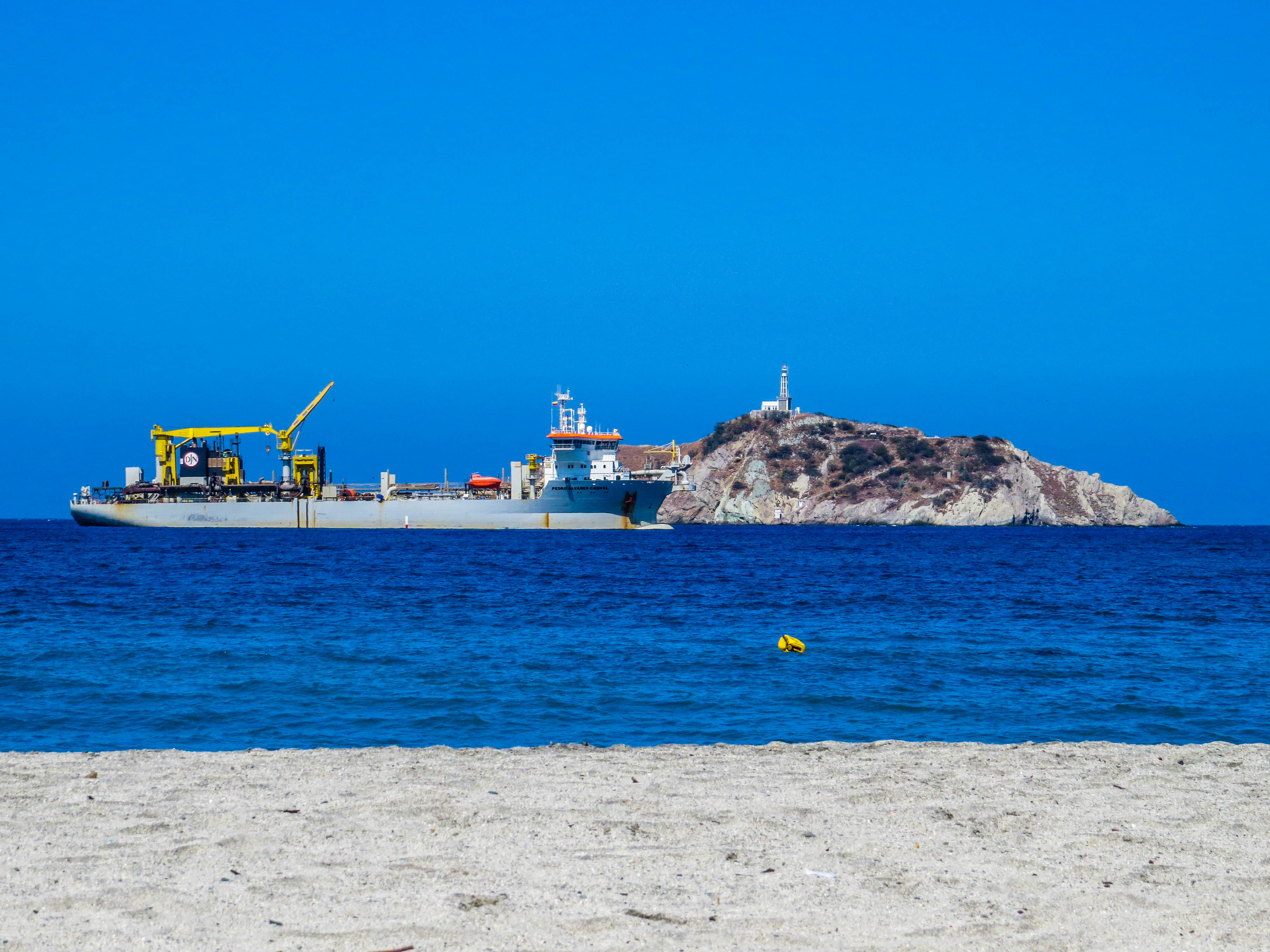 Guía de los barcos en las oscuras noches de penumbras.